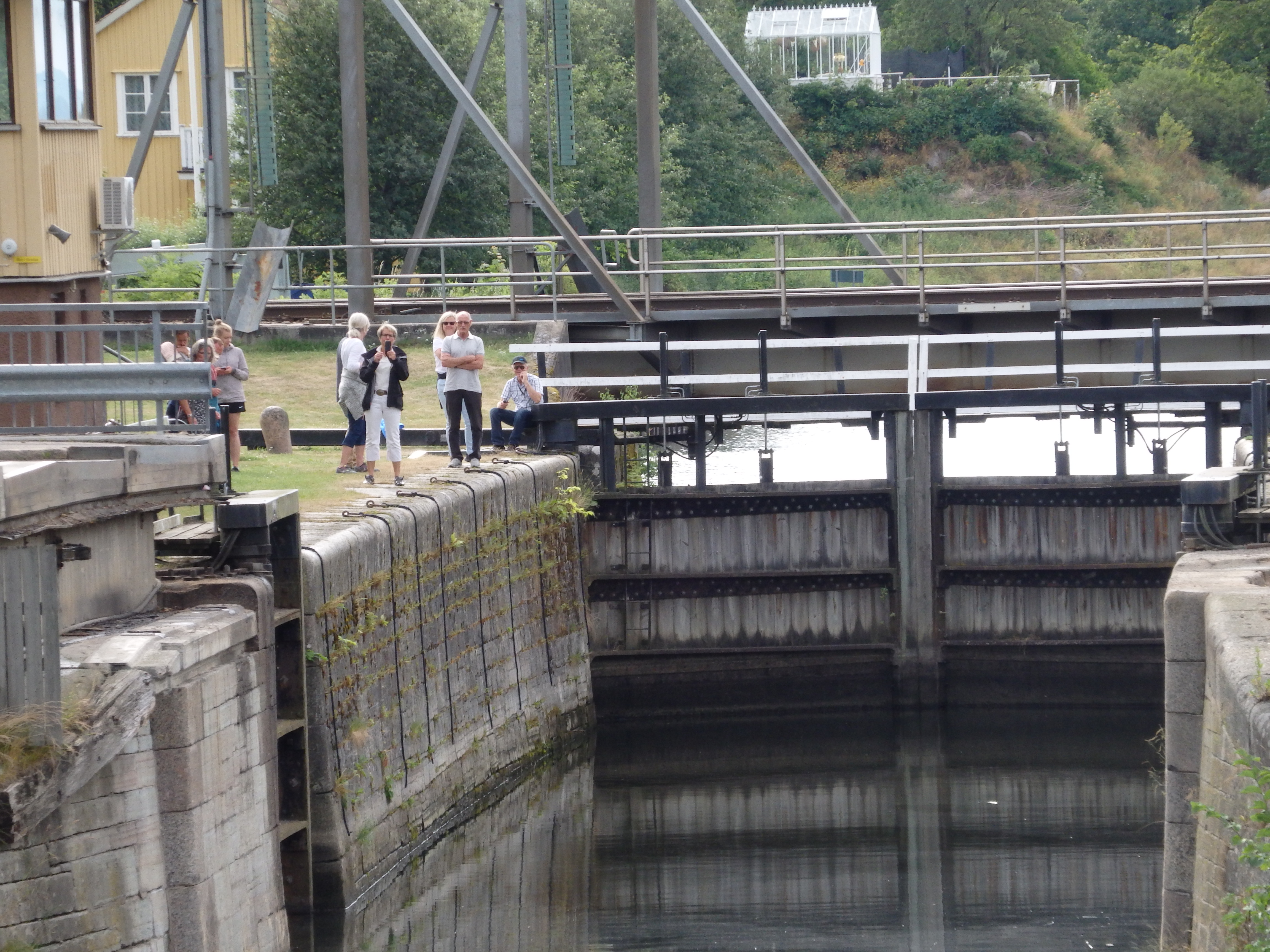 Norsholm sluse